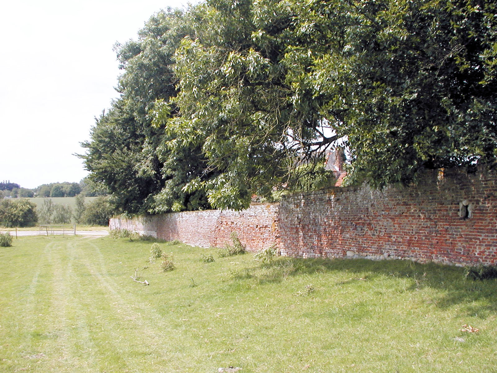 Mur sud du grand jardin d'Hougoumont